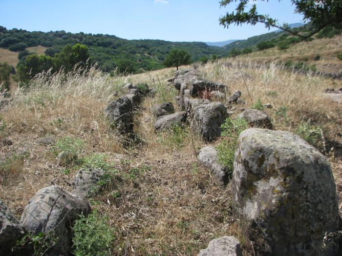 Tomba dei giganti di Pedras Doladas